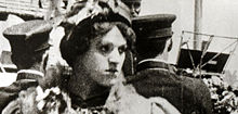 Charlie Chaplin en una escena de la película A Busy Day (1914).